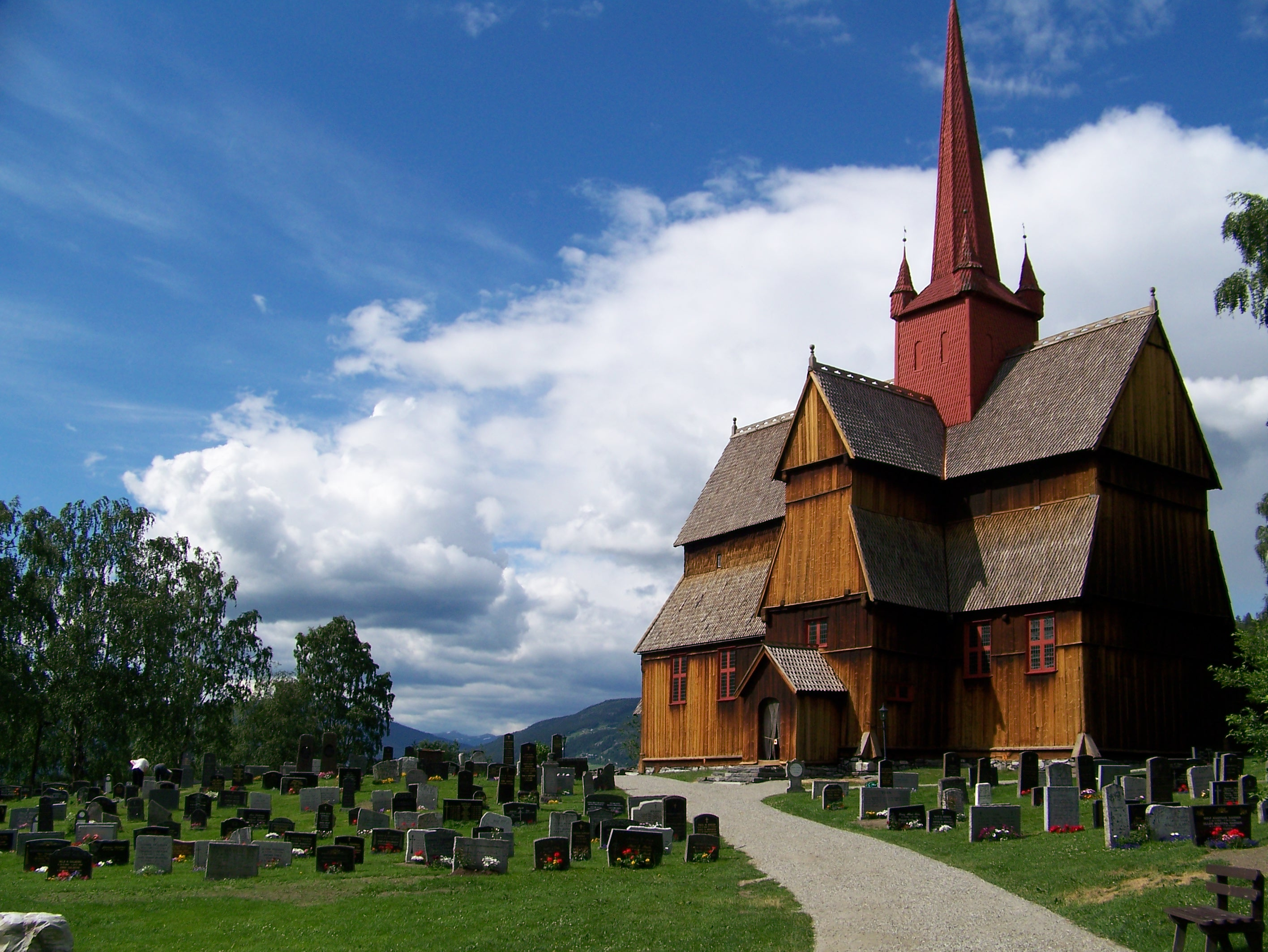 Ringebu stavkyrkje